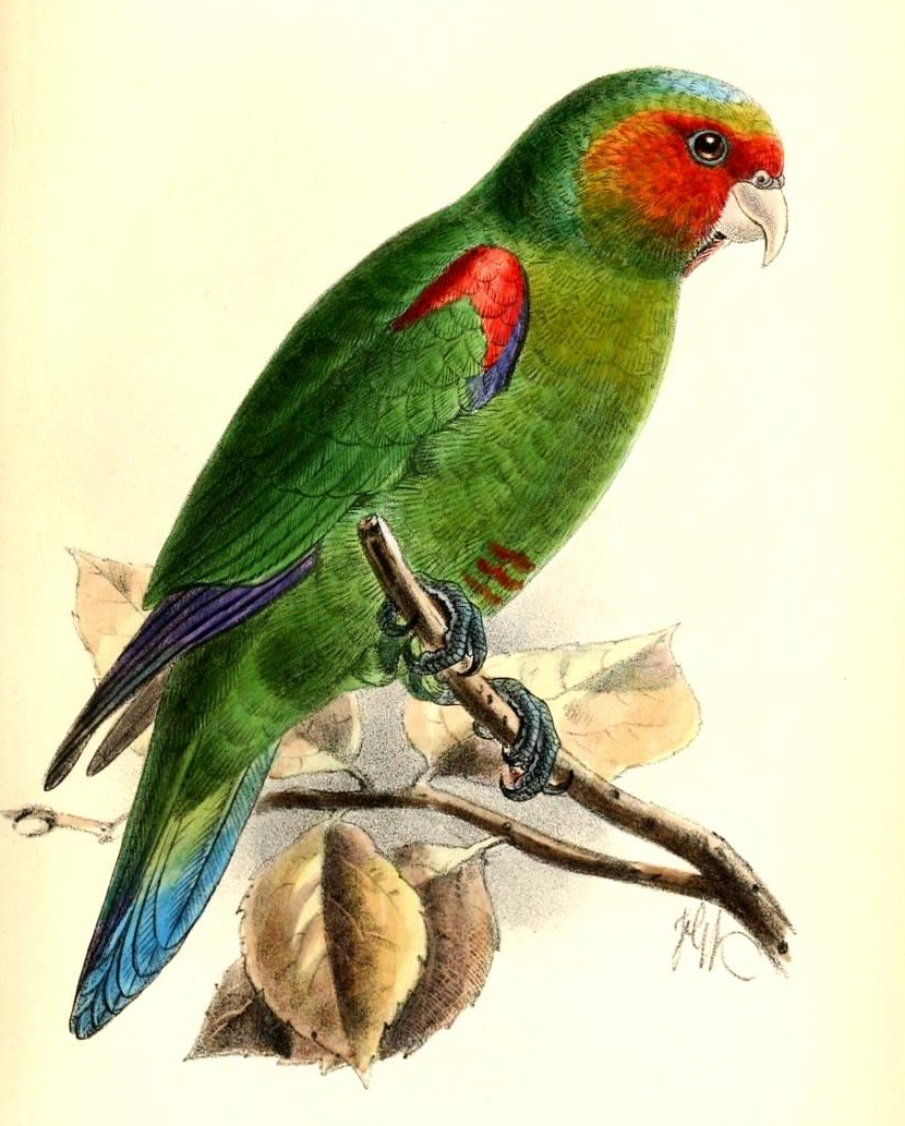 Hapalopsittaca pyrrhops (Pionopsittacus pyrrhops)